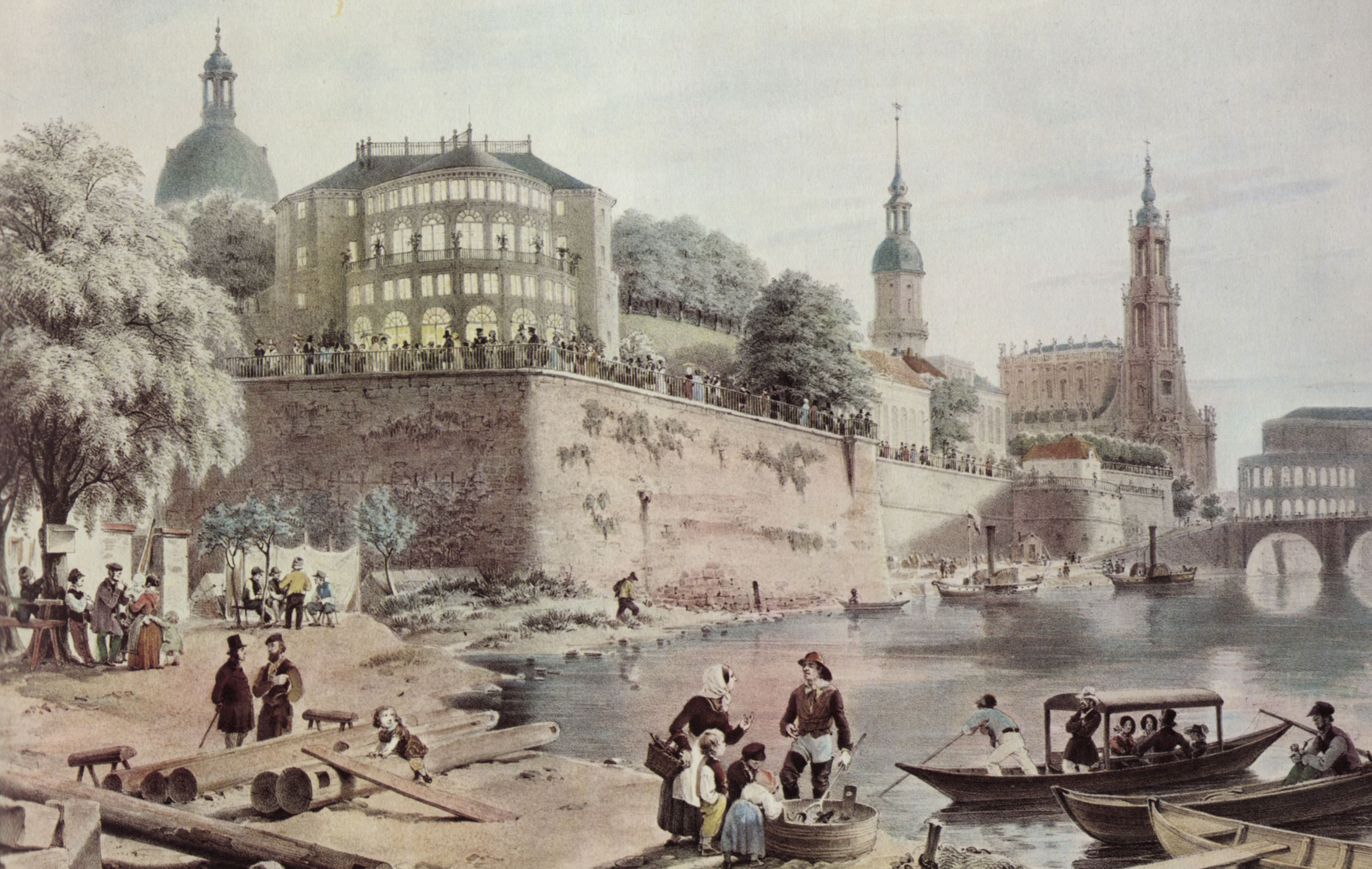 Brühlsche Terrasse